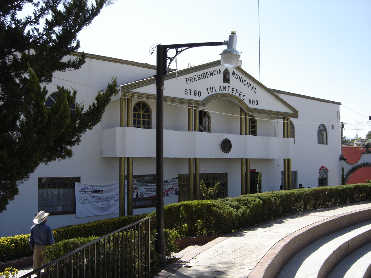 Presidencia Municipal.